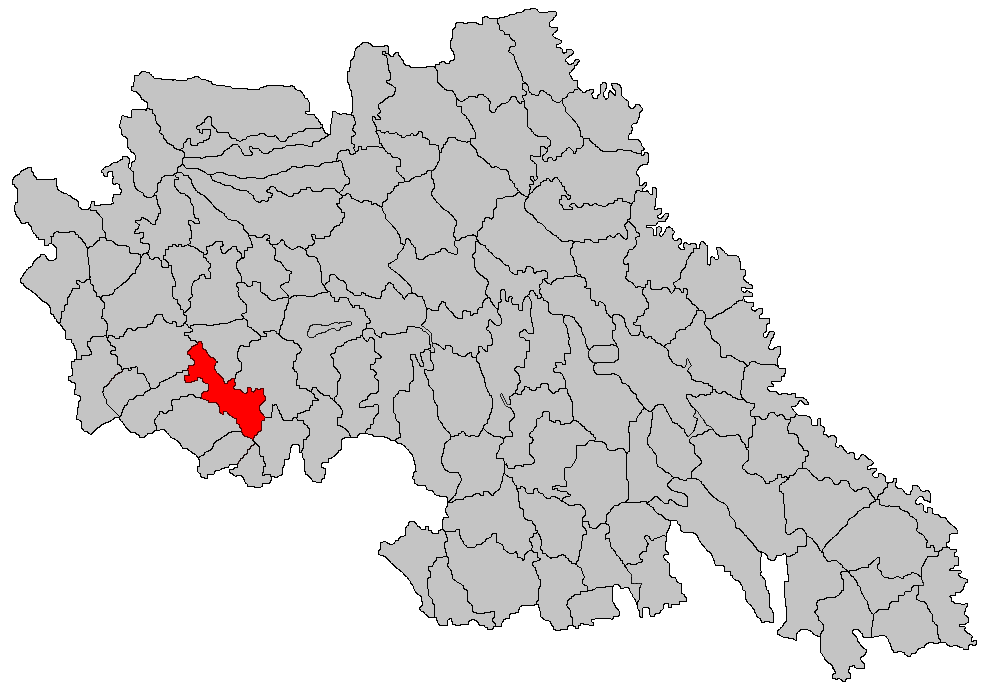 Categorie:Hărţi ale judeţului Iaşi